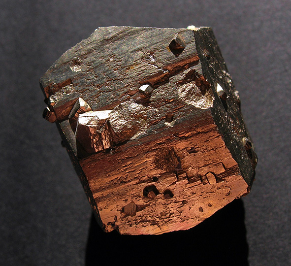 Pyrite